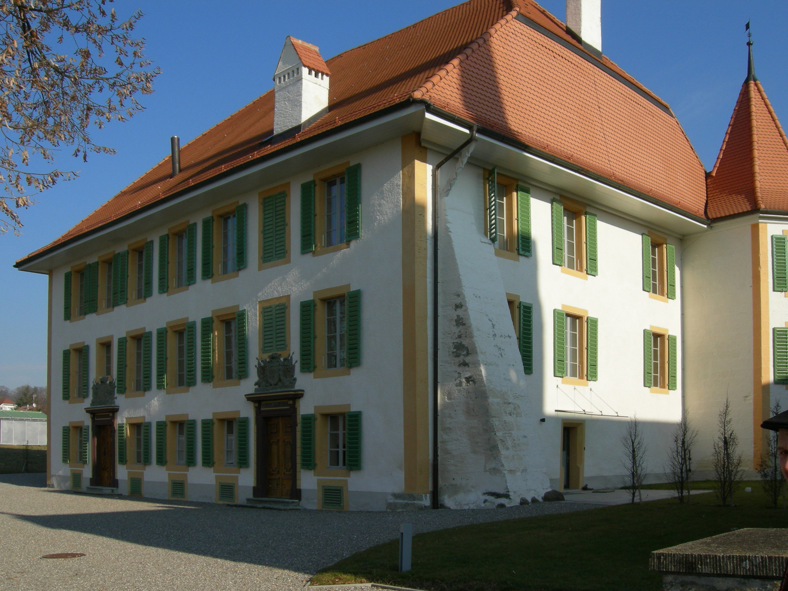 Mézières, château